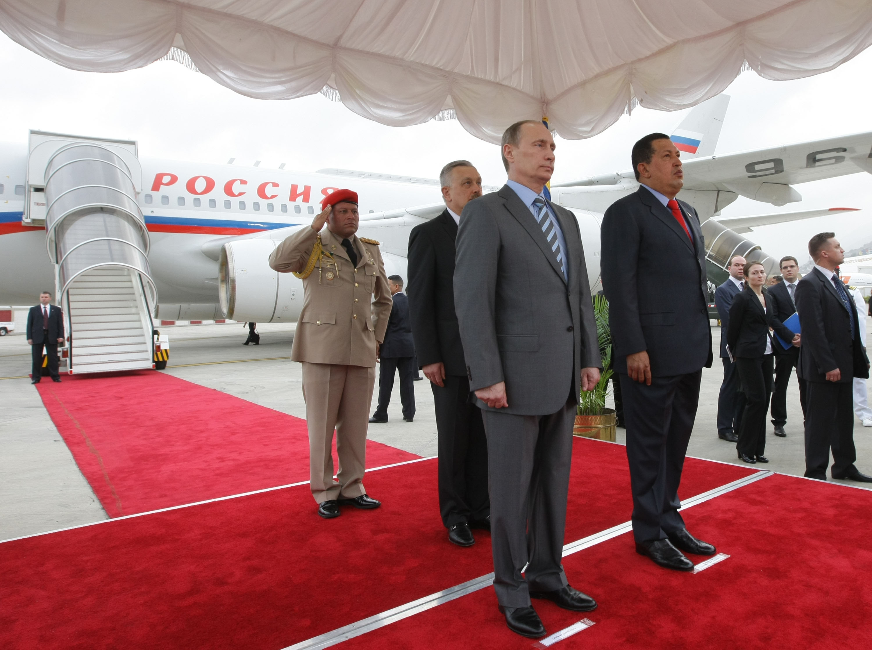 Председатель Правительства Российской Федерации В.В.Путин прибыл с рабочим визитом в Боливарианскую Республику Венесуэла